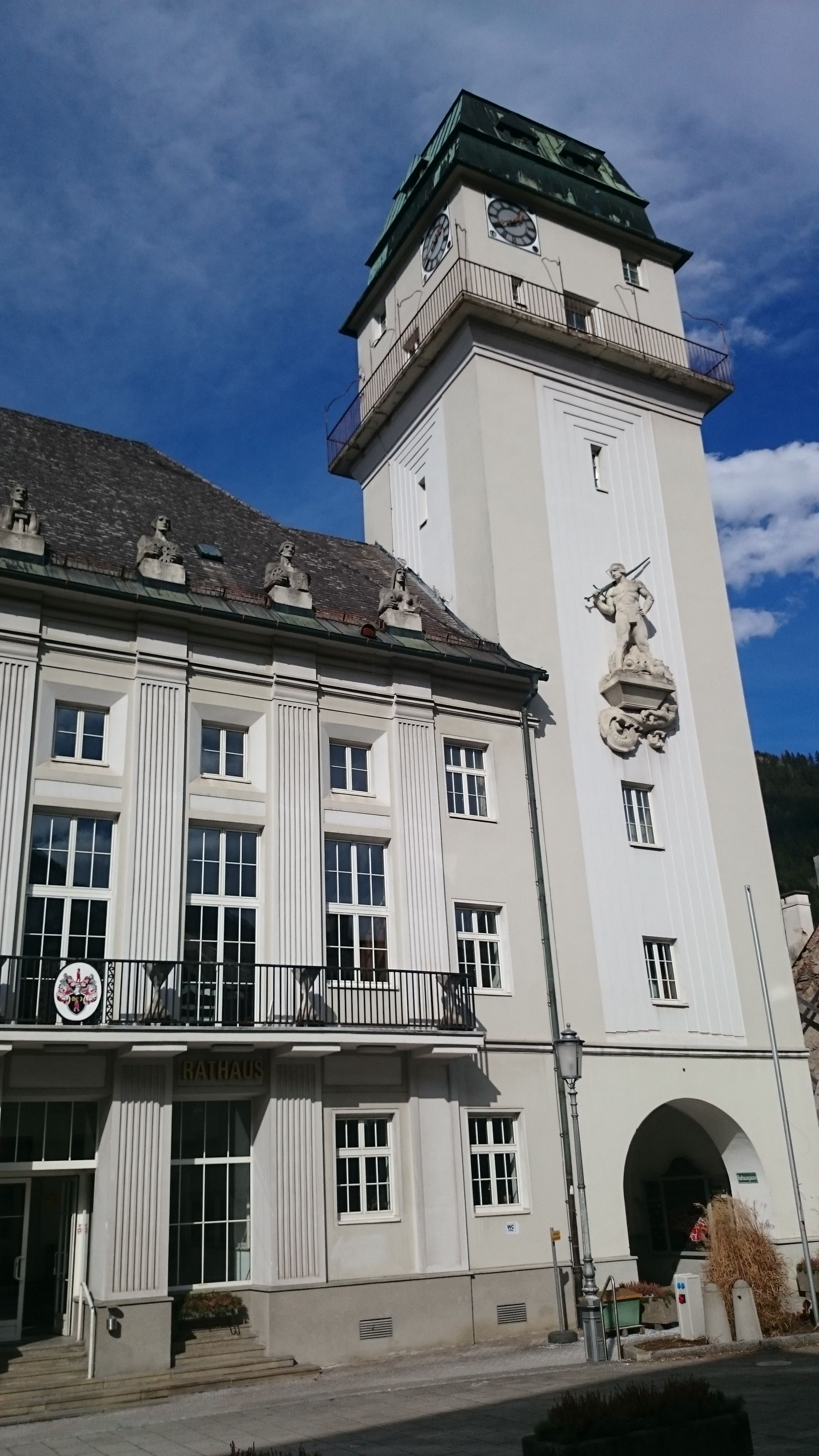 Rottenmann, Rathaus